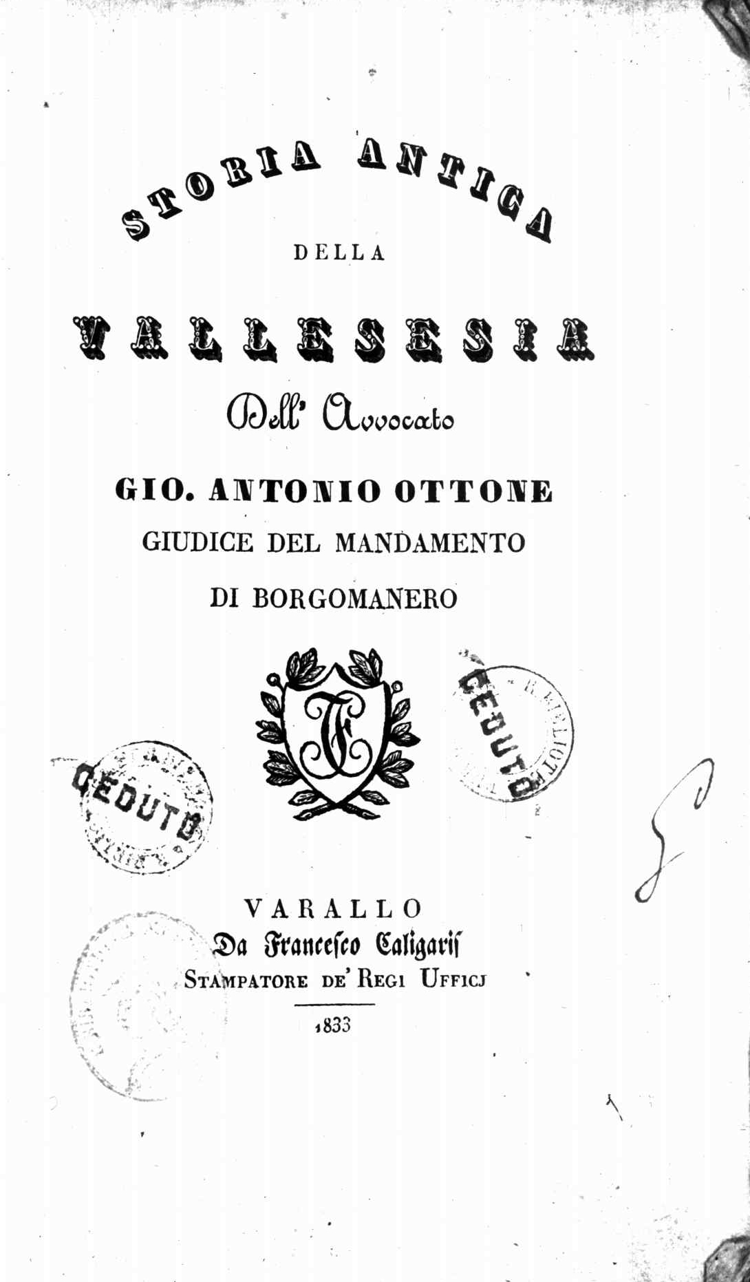 Frontespizio